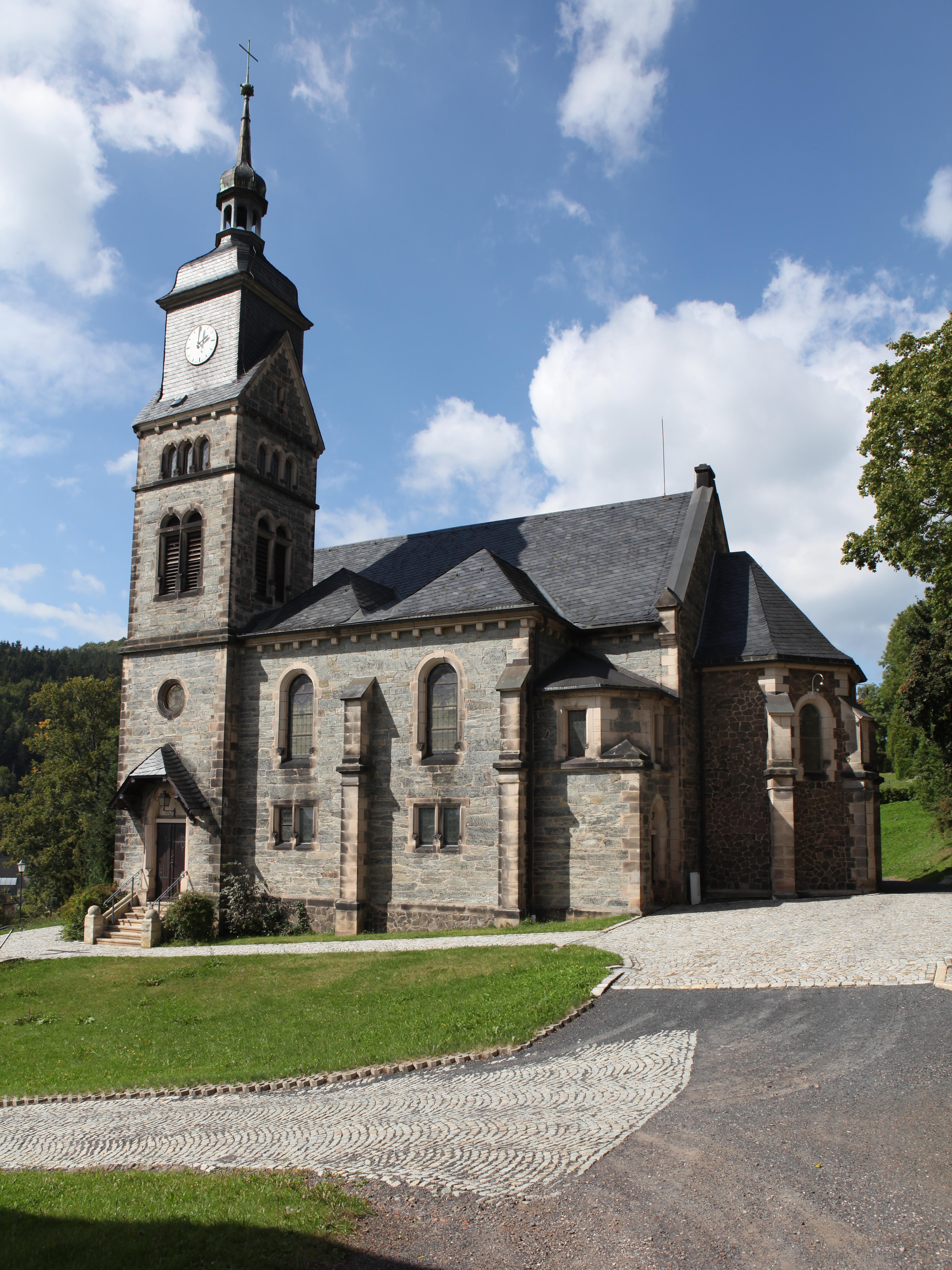 Ev.-luth. Kirche St. Michael in Steinbach, OT von Sonneberg, in Thüringen